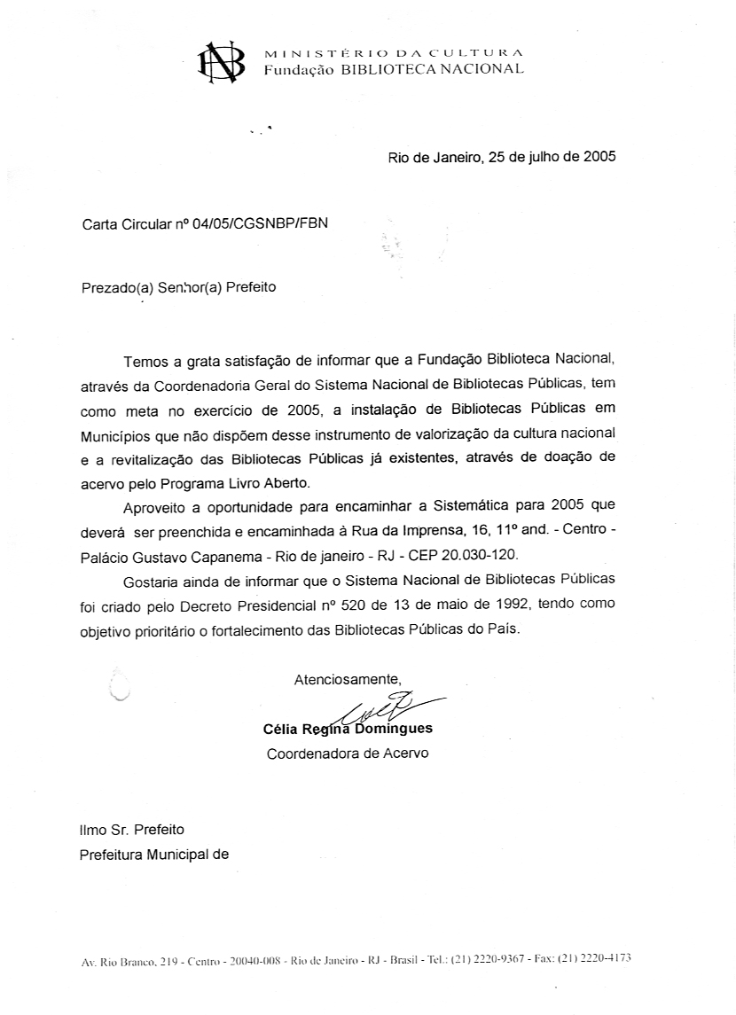 Carta circular do Sistema nacional de biblioteca Públicas/Ministério da Cultura para prefeitos sobre o Programa Livro Aberto.